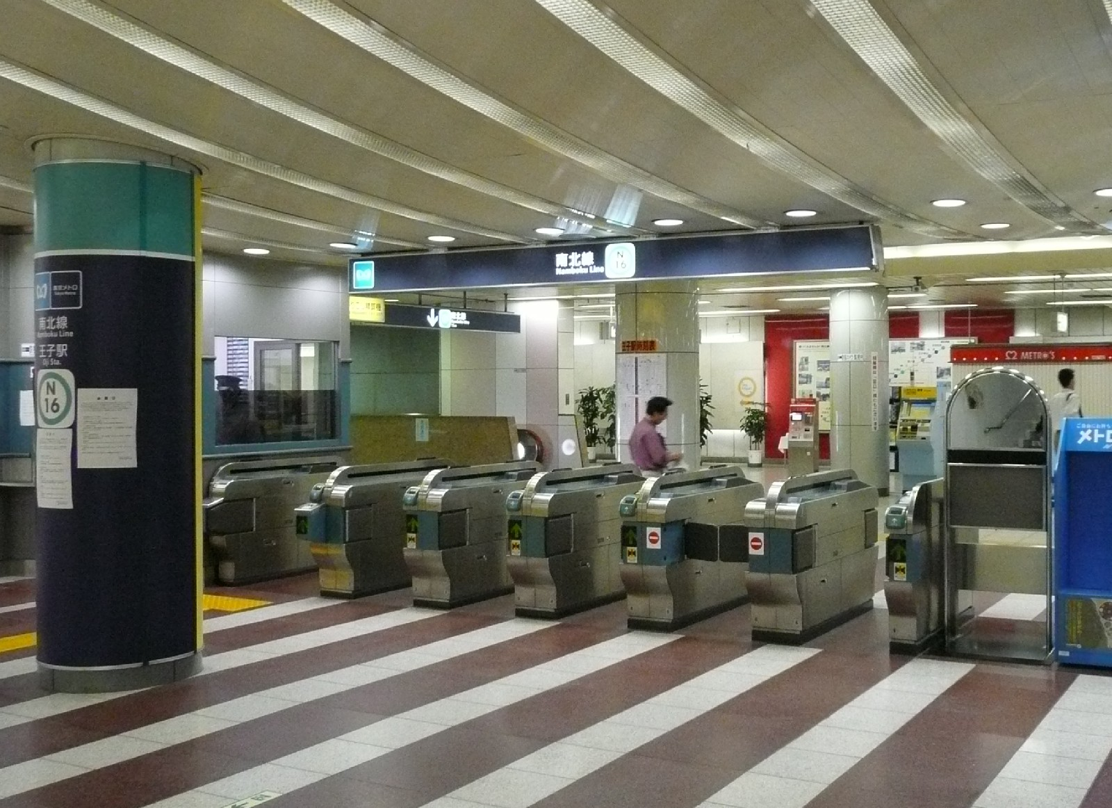 東京地下鉄王子駅改札口